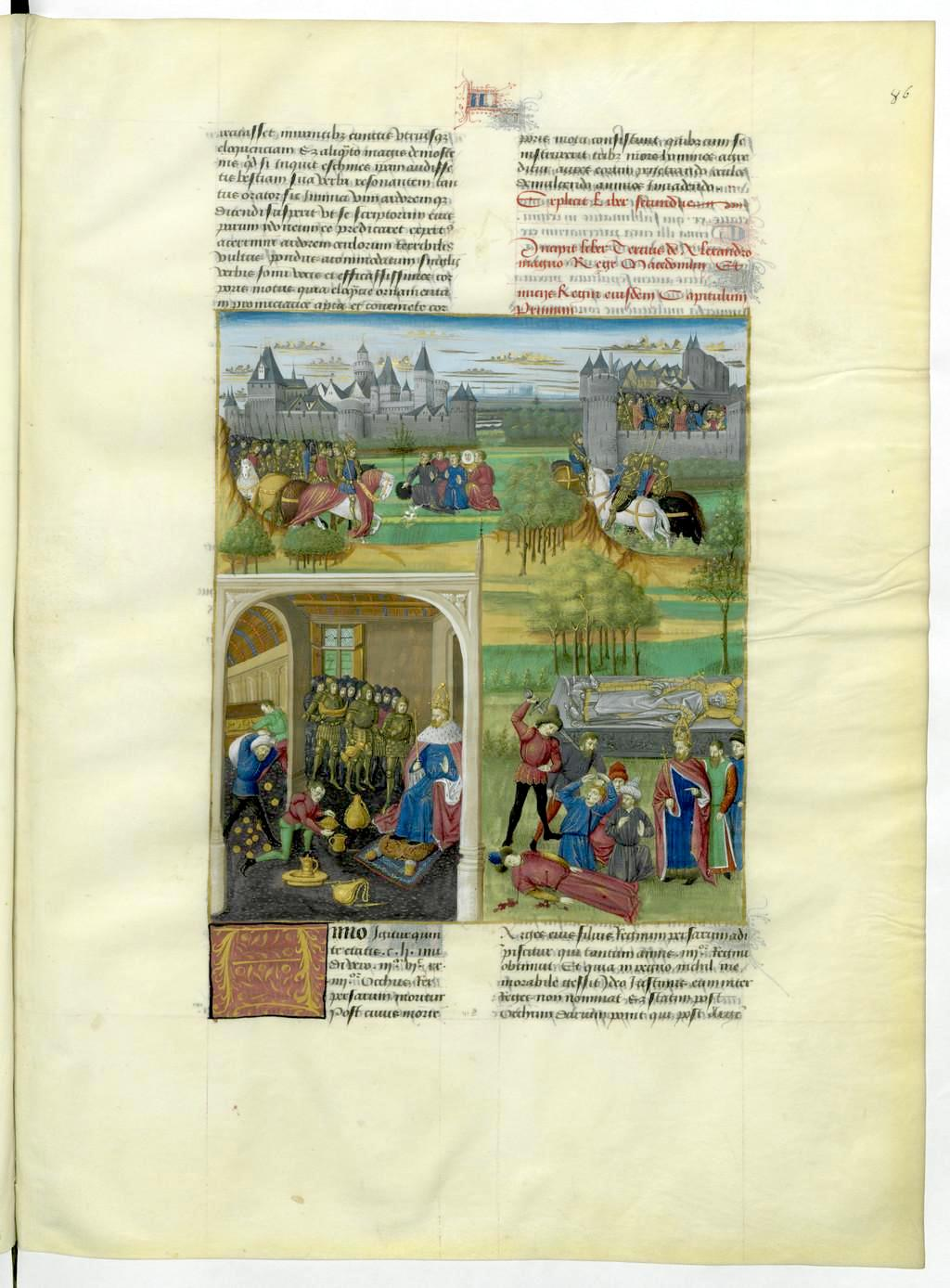 Mare Historiarum - BNF Lat4915 Fol. 086r